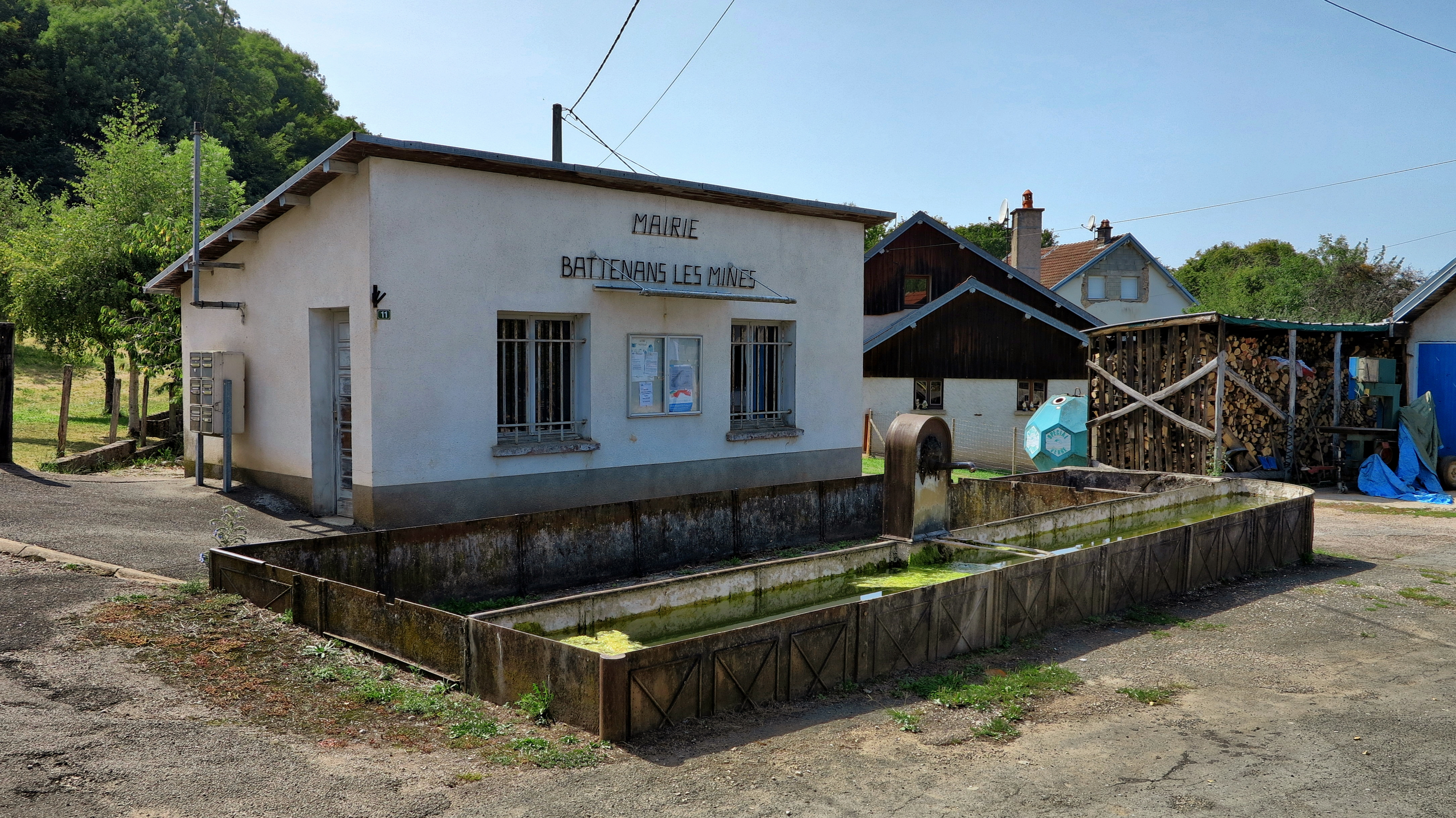 Le lavoir-abreuvoir devant la mairie